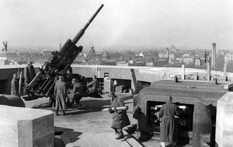 Berlin, Flakturm am Zoo ADN-Zentralbild/Archiv II. Weltkrieg 1939-1945 Schwere Flak in Feuerbereitschaft auf dem Flakturm des Berliner Zoo-Bunkers, eine der wenigen großen Schutzanlagen aus Eisenbeton. Aufnahme: Pilz April 1942